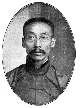 中文（台灣）: 中華民國國會議員